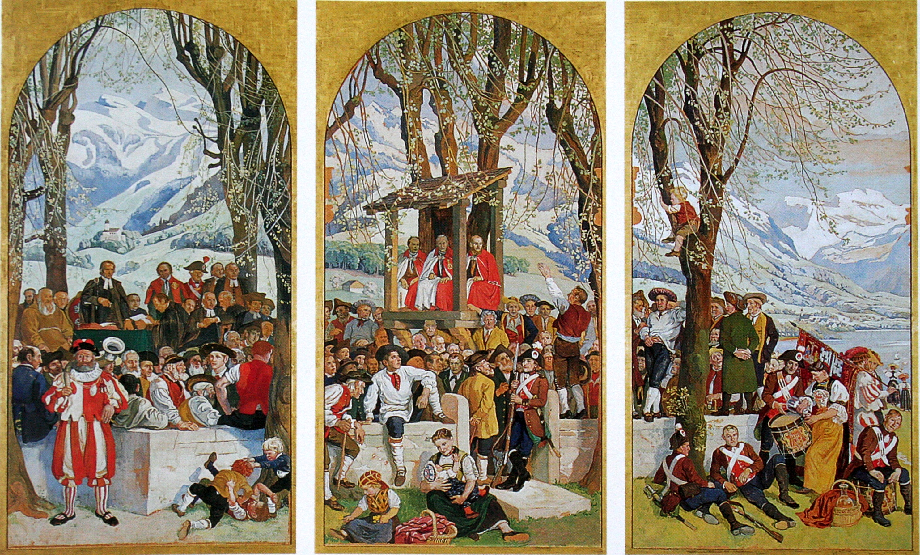 Landsgemeinde, rechter Teil, Gemälde von Albert Welti (1862-1912), 1910/12, fünf Felder, je 273 x 144 cm, Guache auf Papier auf Leinwand, Kunsthaus Zürich, Eigentum der Schweizerischen Eidgenossenschaft. Das Original befindet sich im Ständeratssaal des Bundeshauses in Bern.